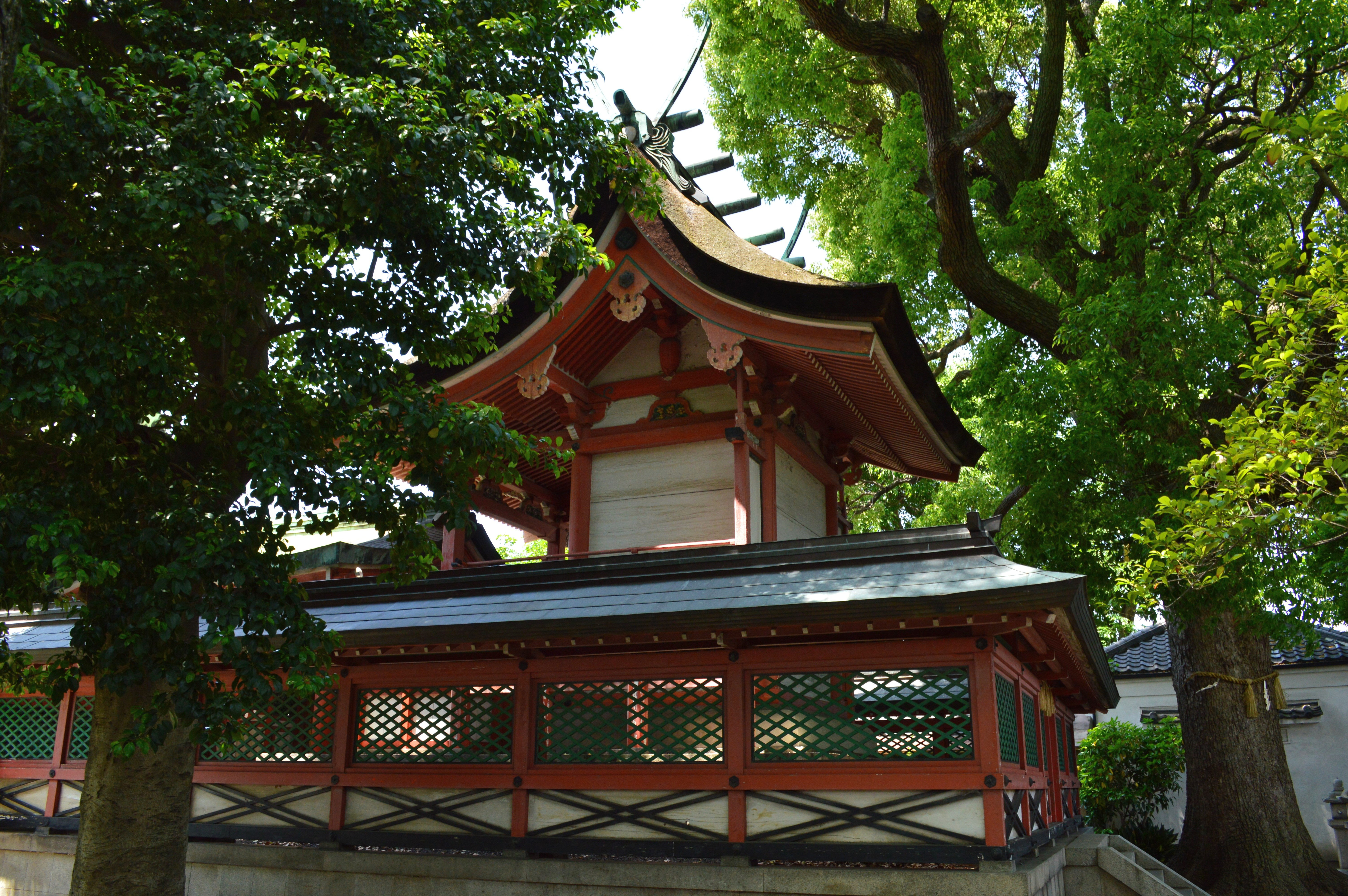 生根神社 (大阪市住吉区) 本殿